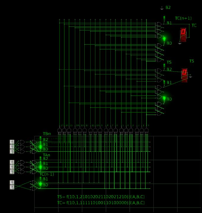 Снимок модели трёхбитного несимметричного трисумматора в логическом симуляторе Atanua.